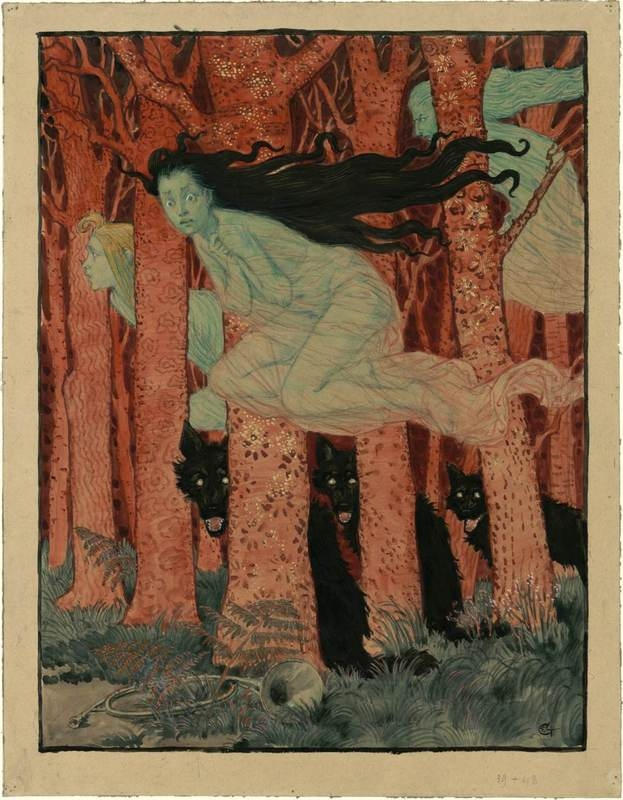 Trois femmes et trois loups // Crayon, aquarelle, encre de chine et rehauts d'or sur papier